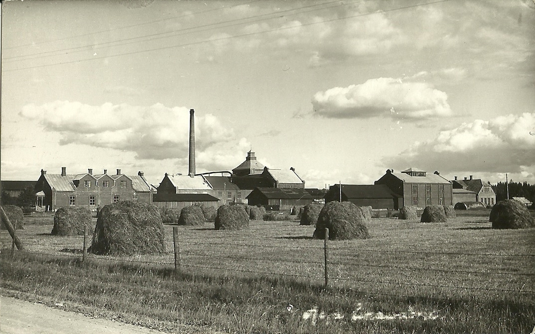 Abja linavabrik, vaade läänest.